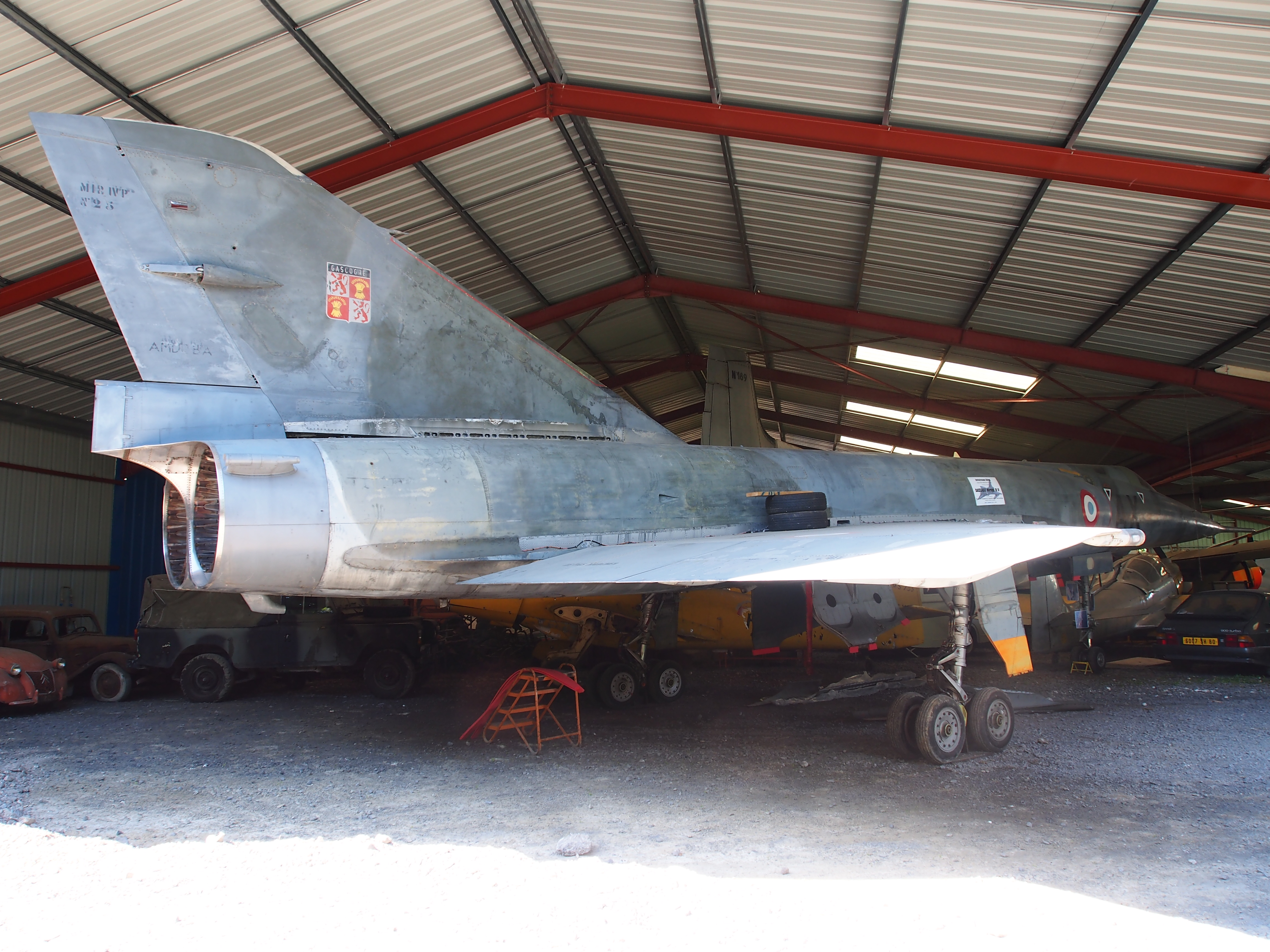 Mirage IV of escadron de bombardement 1/91 Gascogne. Photographed at the Musée de l'Epopée de l'Industrie et de l'Aéronautique in Albert, France.